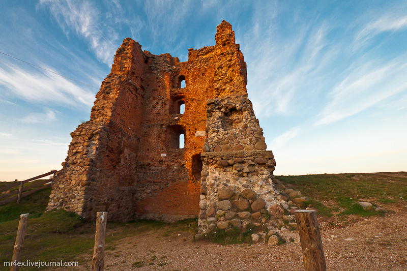 Шчытоўка. Навагрудскі замак